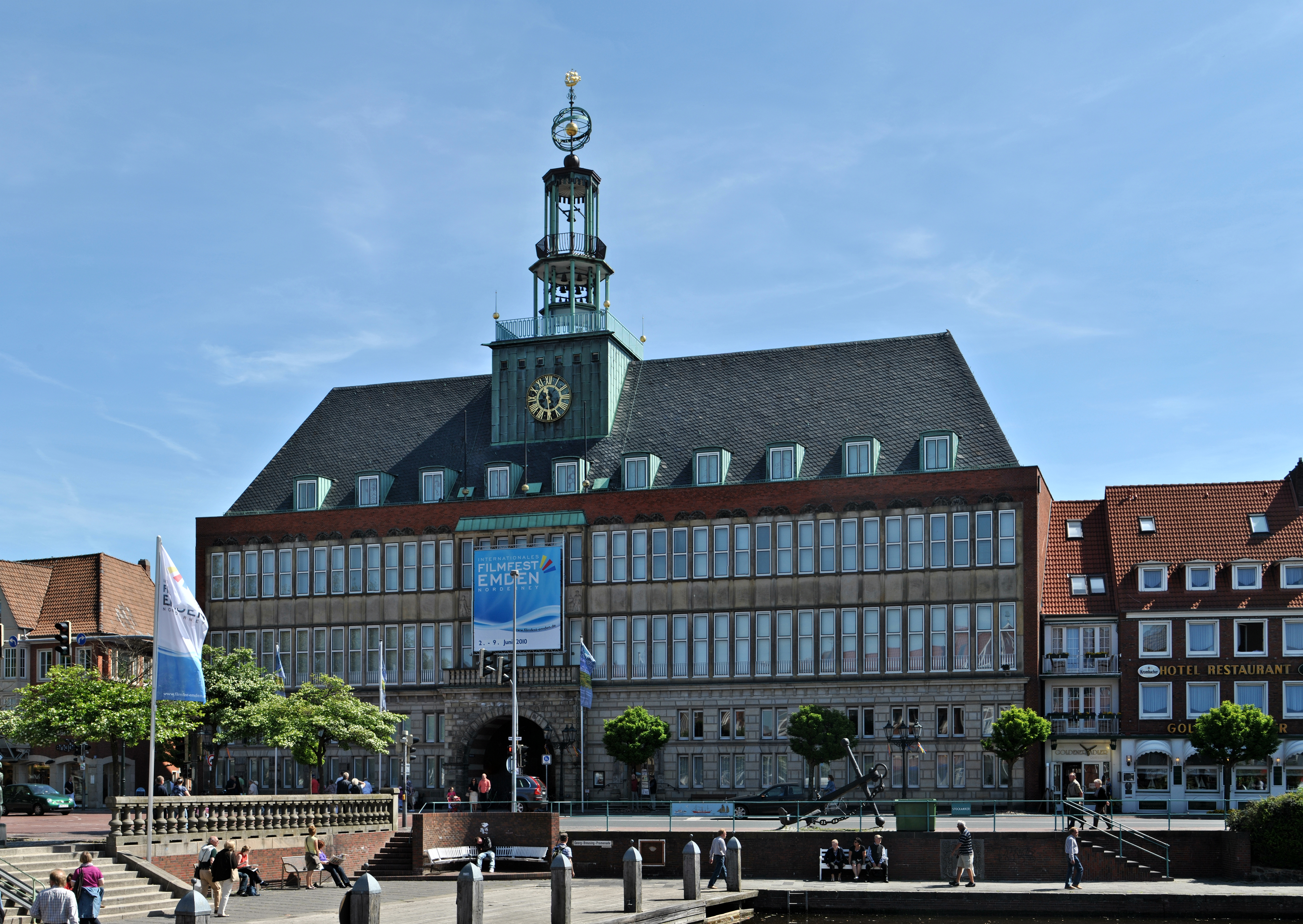 Emder Rathaus mit dem integrierten Ostfrieser Landesmuseum